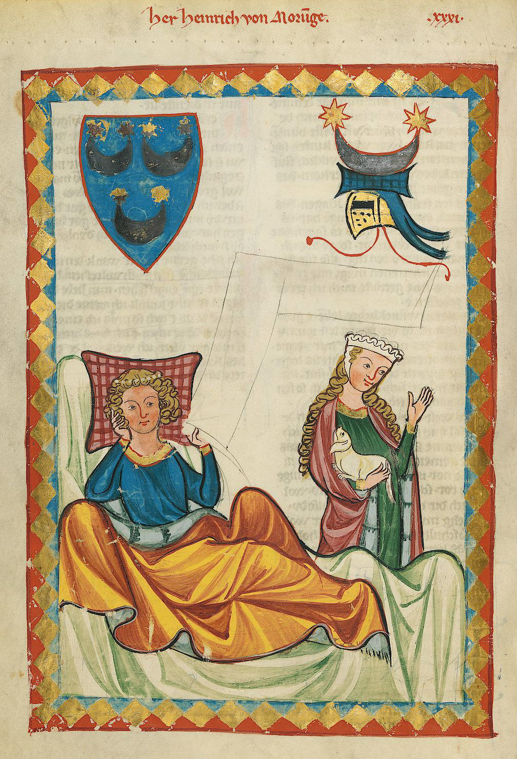 Codex Manesse, UB Heidelberg, Cod. Pal. germ. 848, fol. 76v: Herr Heinrich von Morungen